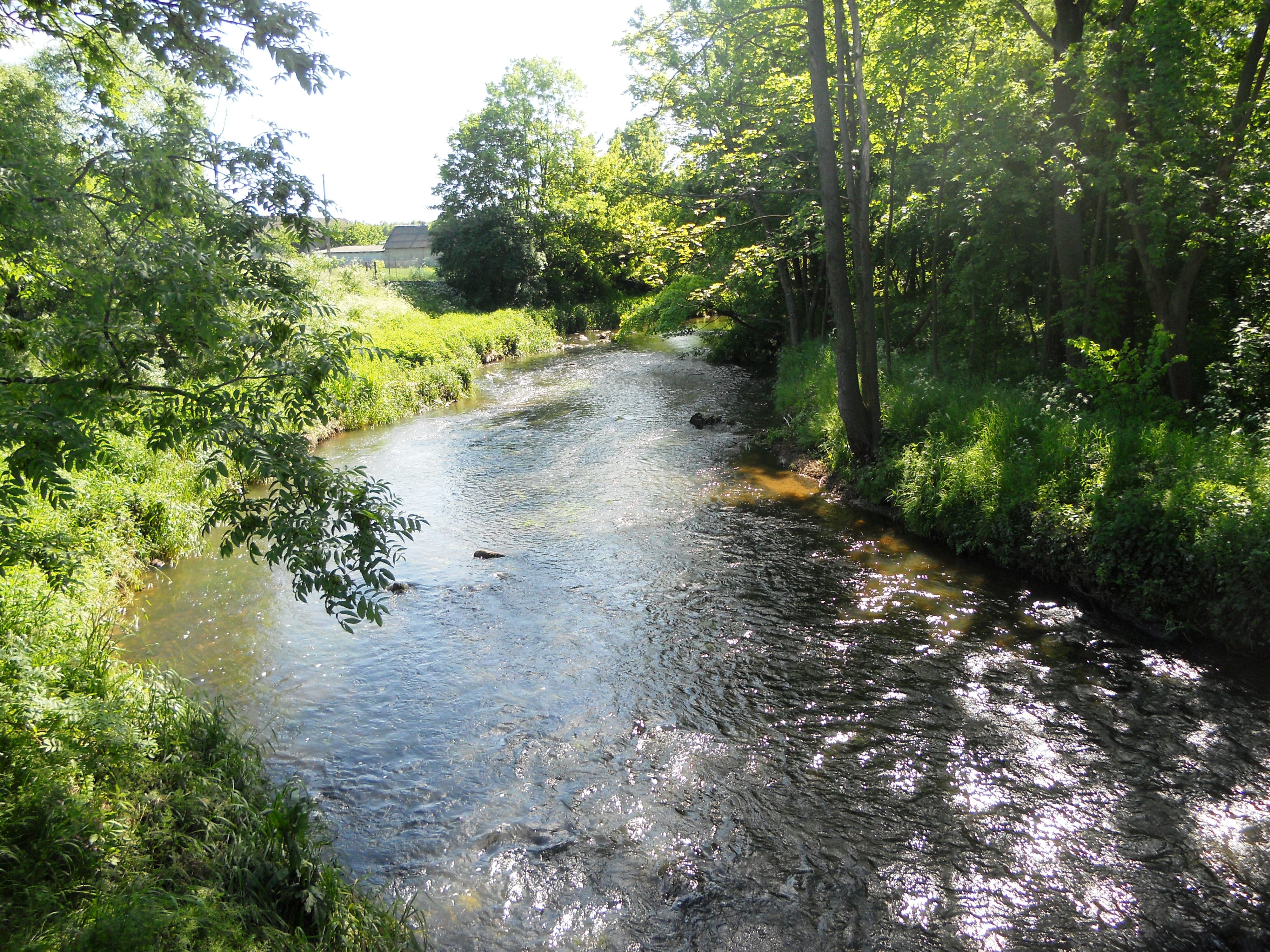 Dłużew - rzeka Świder przepływająca przez wieś